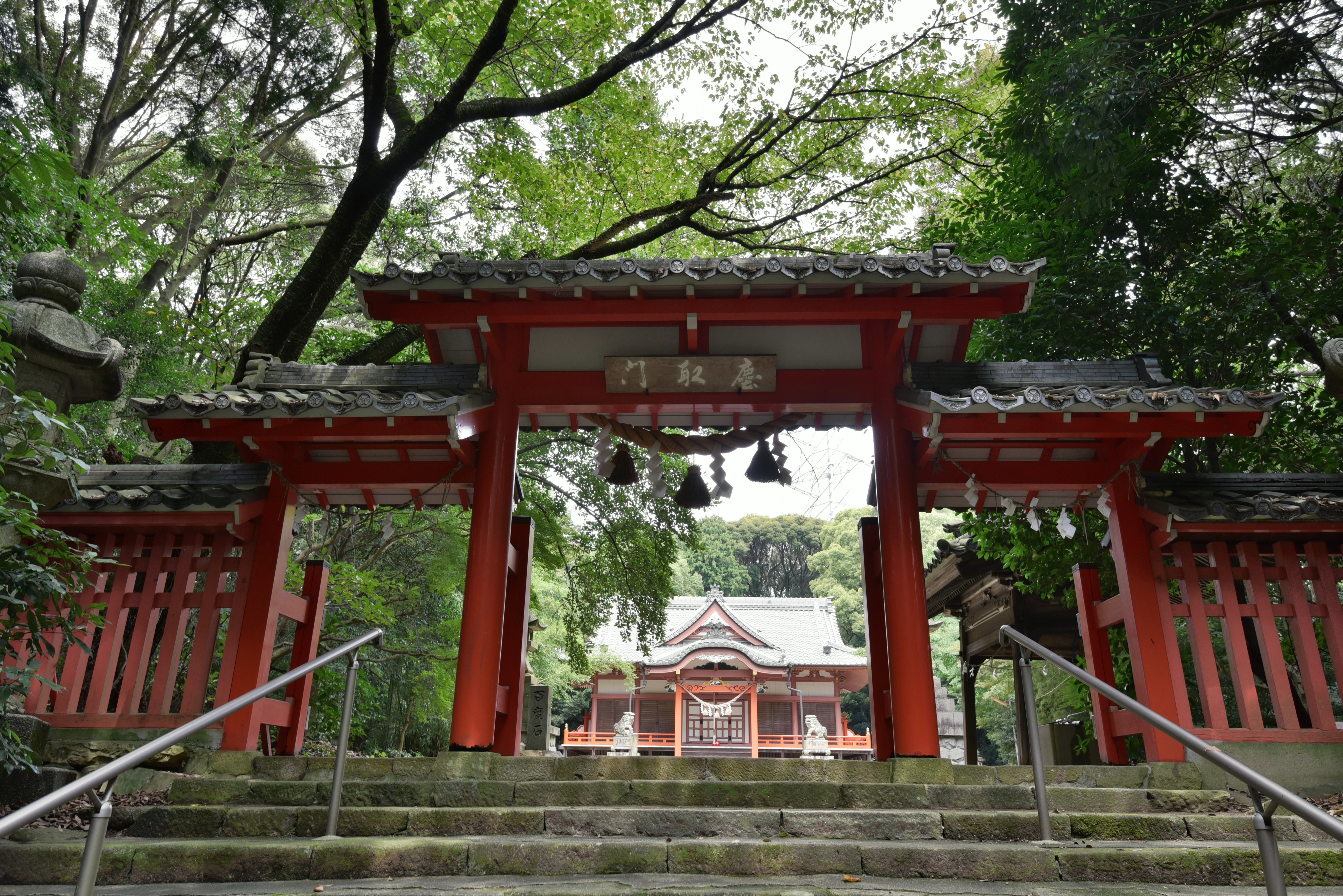 山中八幡宮の慶取門